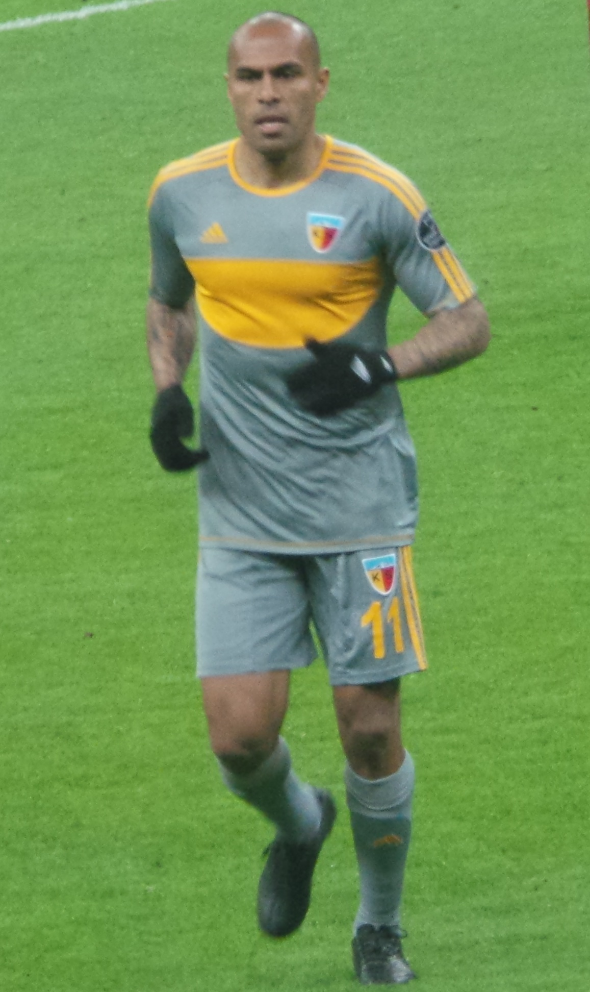 Nobre'13-14